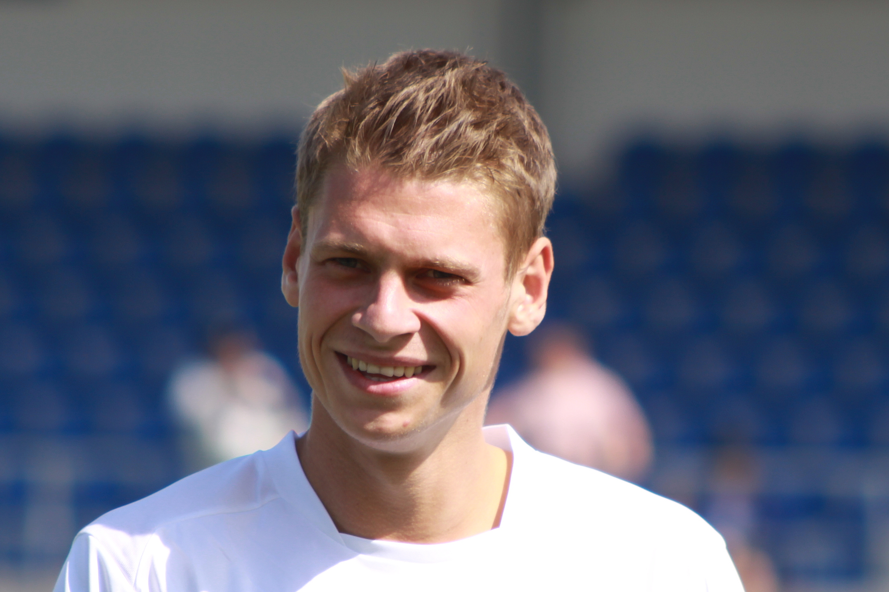 Łukasz Piszczek - Hertha BSC Berlin (2)